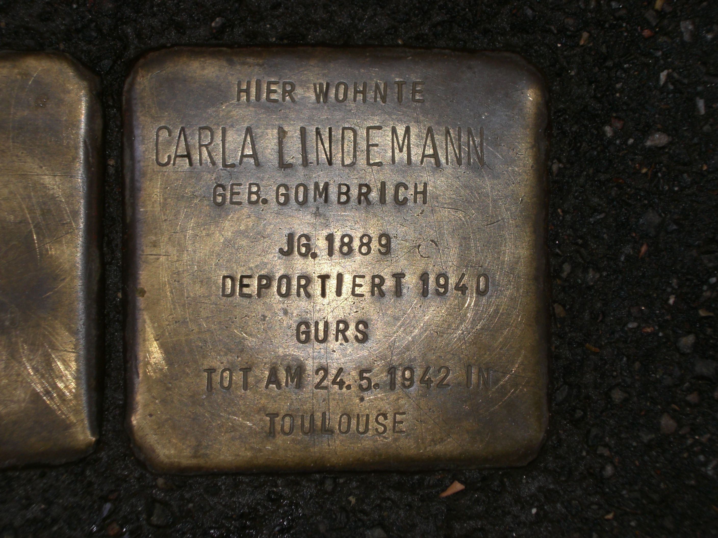 Stolperstein für Carla Lindemann vor dem Haus Engelbergerstraße 39, Freiburg.